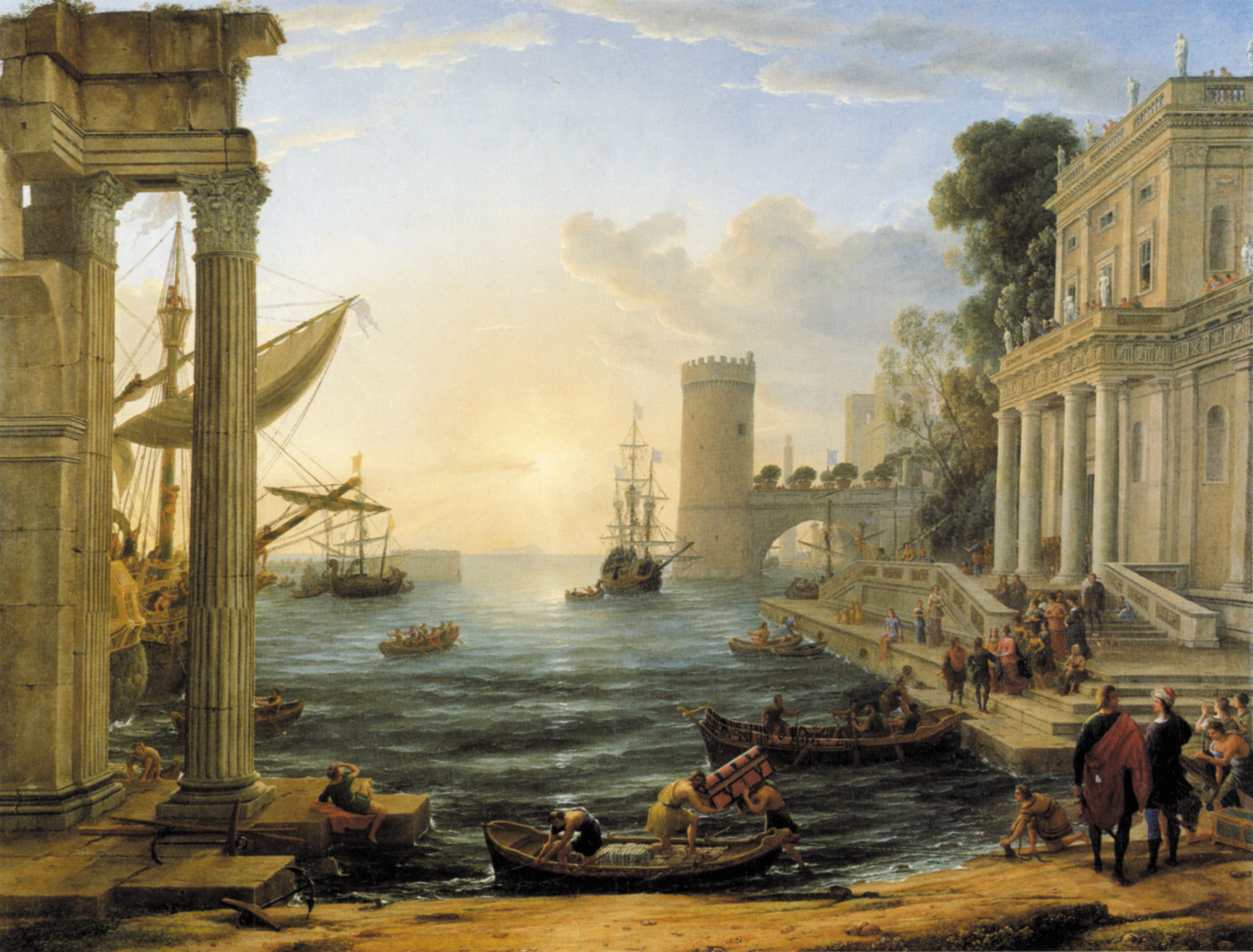 Claude Lorrain: Seehafen mit der Einschiffung der Königin von Saba. 1648, 194 x 149 cm. National Gallery, London.